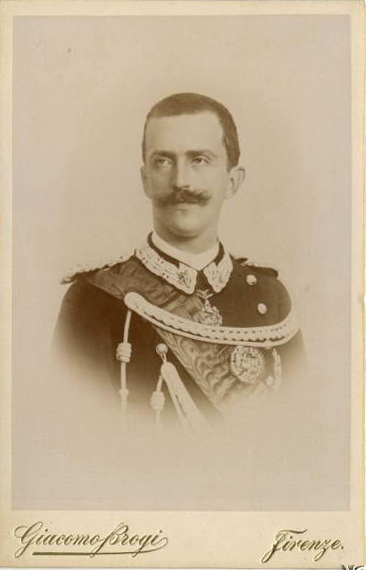 Carlo Brogi (1850-1925) - Vittorio Emanuele III - 1895.